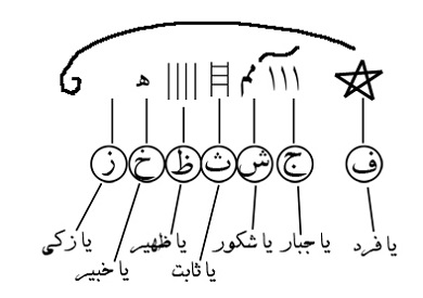 حرز شرف شمس آنطور که باید حکاکی شود.